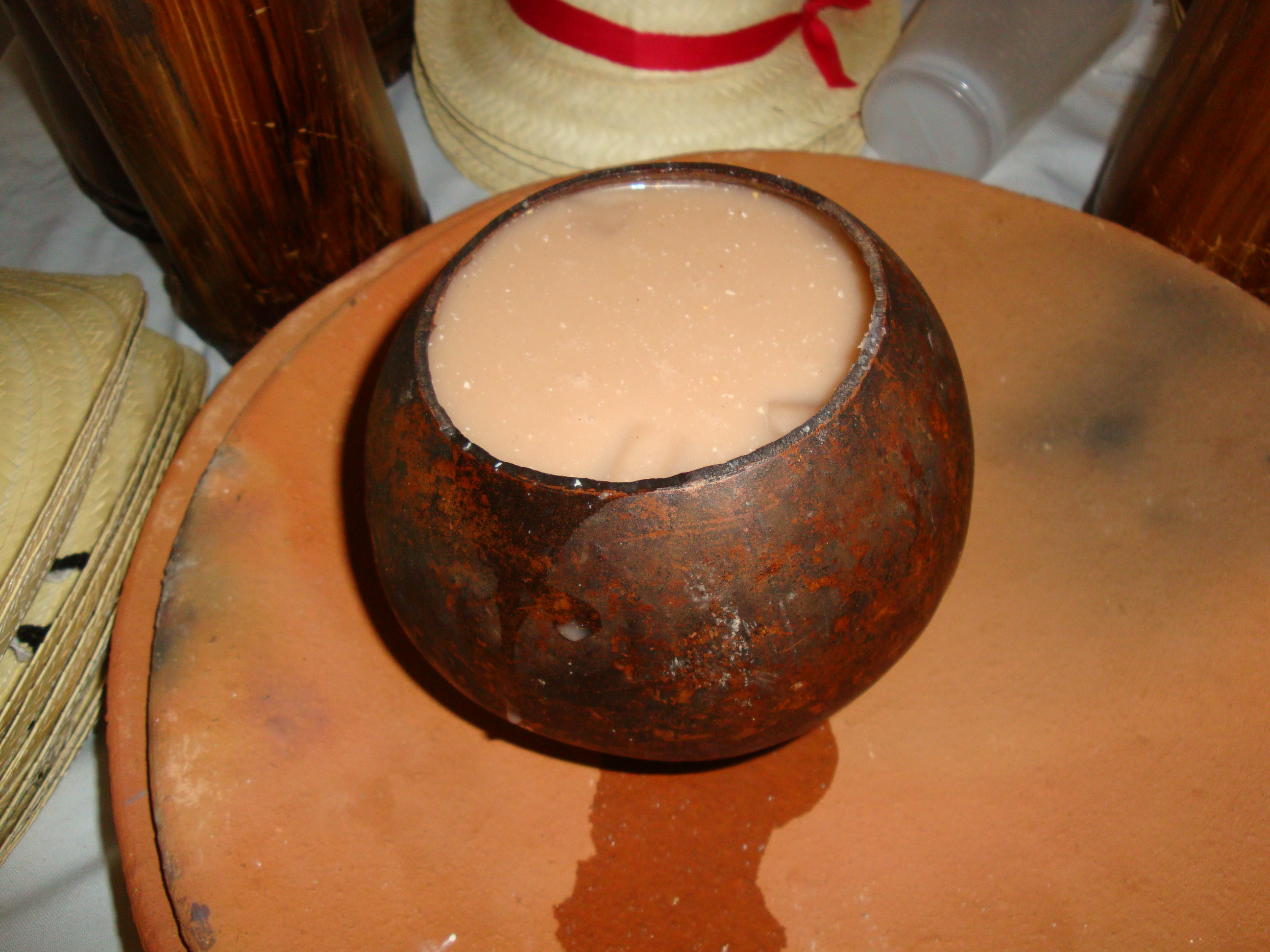 Pozol (bebida tradicional del estado mexicano de Tabasco) servido en "jícara".